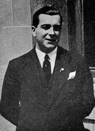 José Echeverría Novoa, fotografía en Vida Gallega 1933